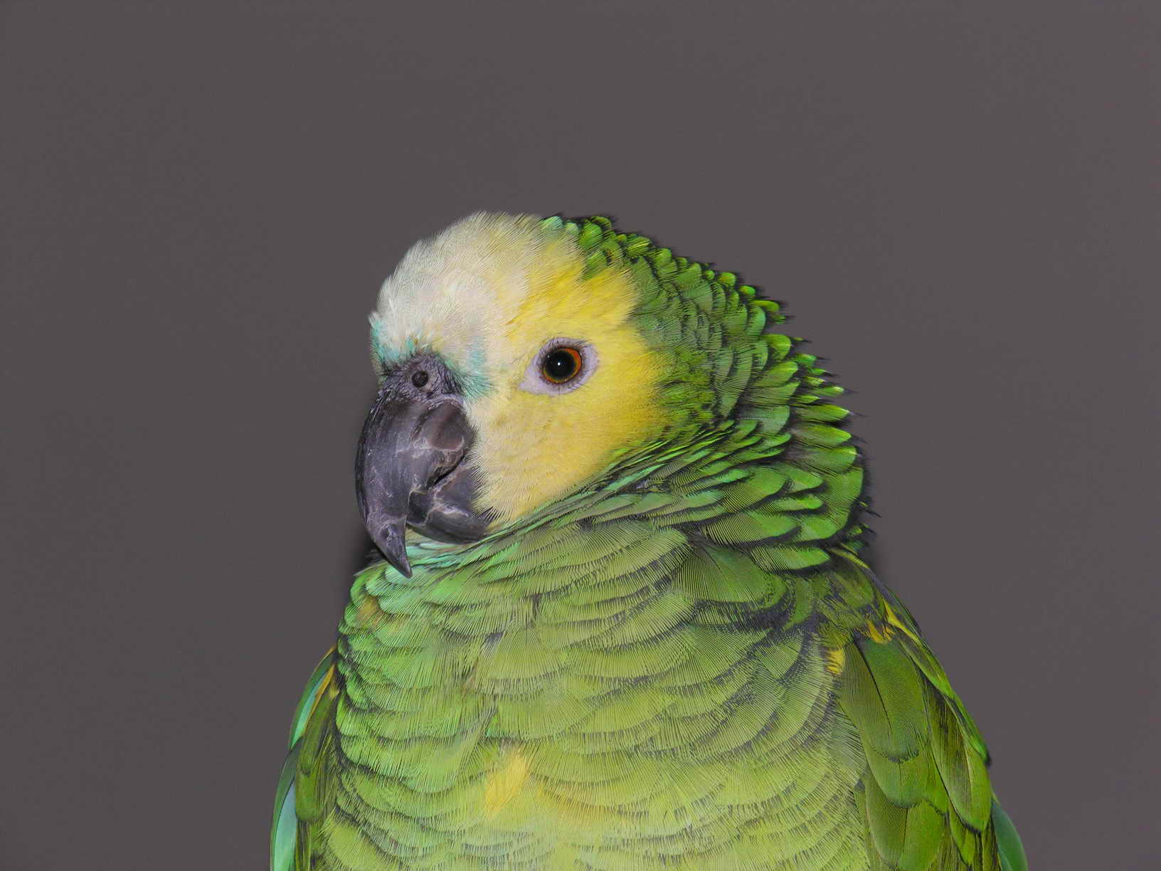 self made. Arzúa - Galicia - Spain